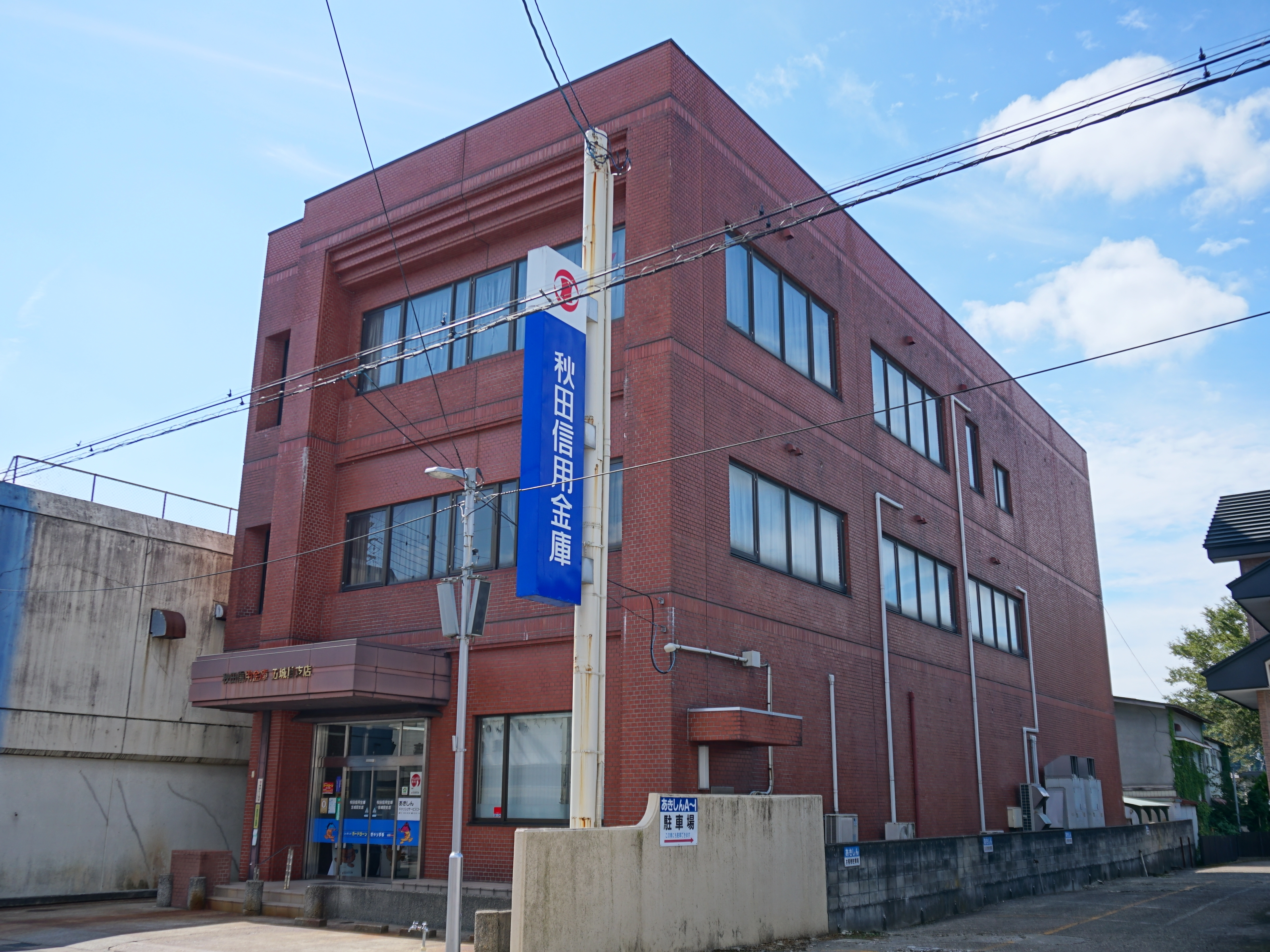 秋田信用金庫五城目支店 (旧・五城目信用金庫本店)